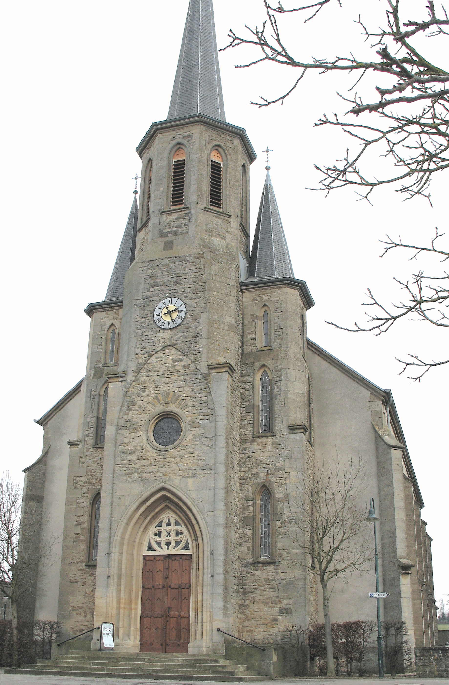 L'église de Roeser (Luxembourg)